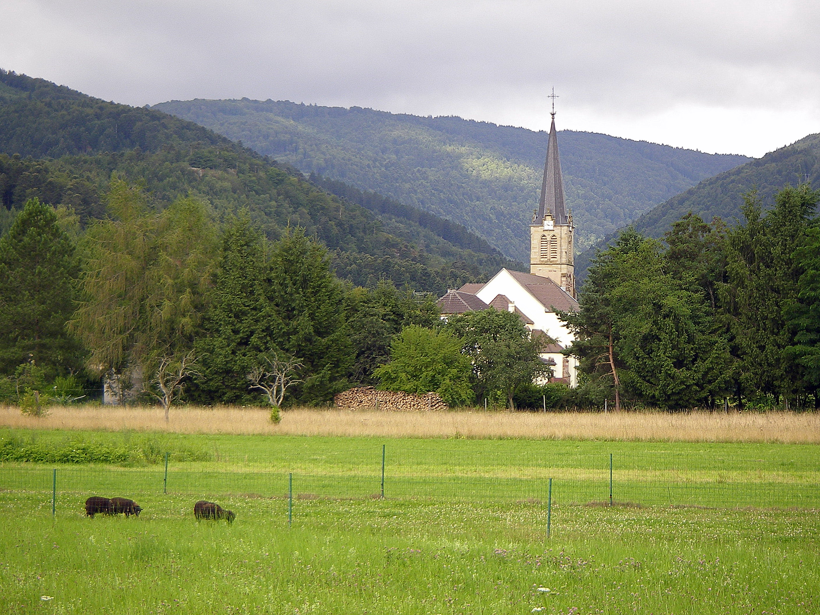 Vue du village de Dolleren (Haut-Rhin, France)